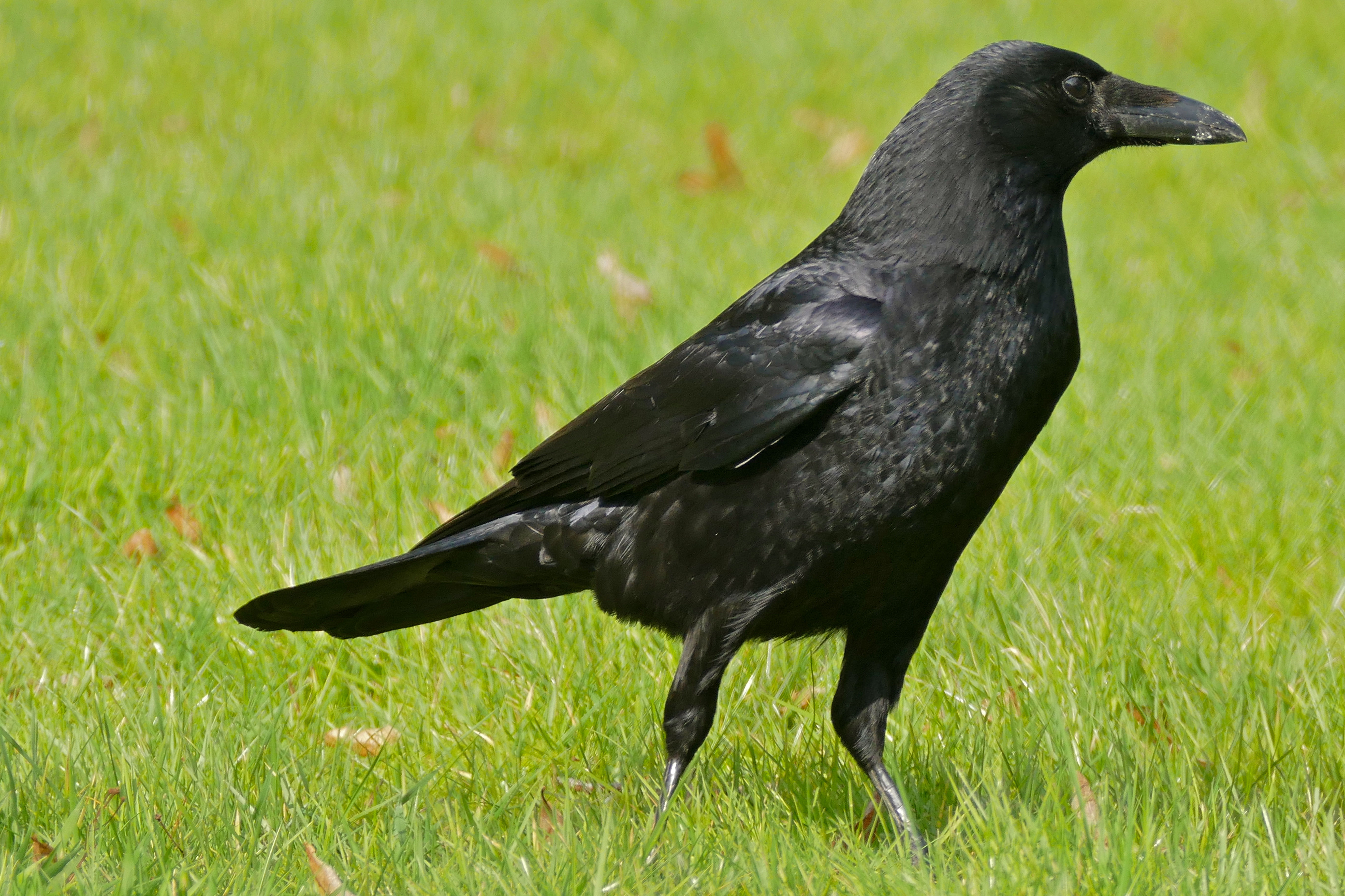 Les Thermes, Bagnoles de l'Orne, Orne, FRANCE